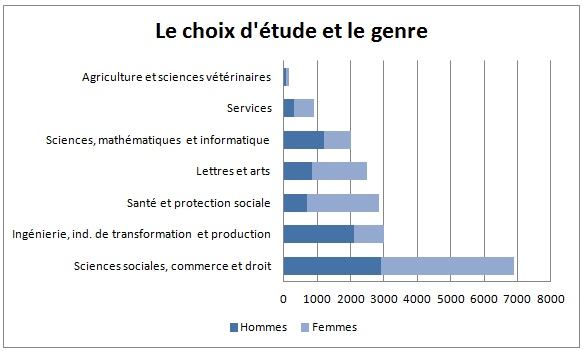 Statistiques provenant d'Eurostat sur le choix d'étude quant au genre